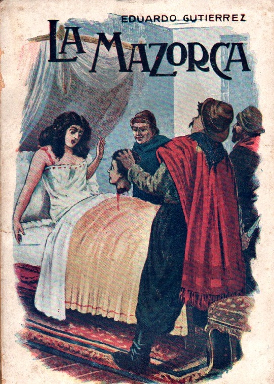 Tapa de una de las ediciones del libro del autor argentino Eduardo Gutiérrez (1851-1889).